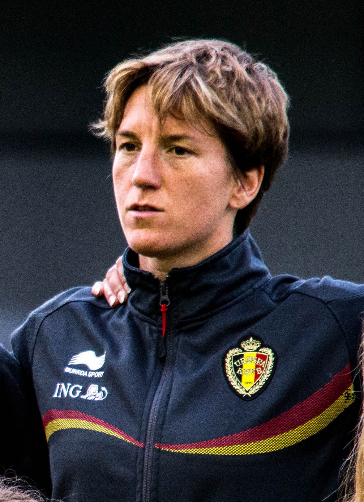 StampMedia